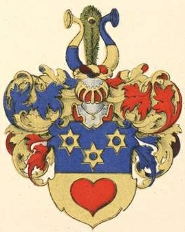 Lipharti suguvõsa aadlivapp